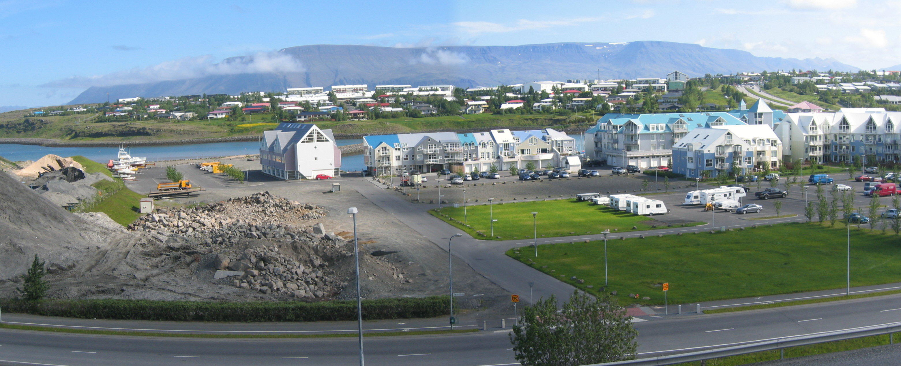 Bryggjuhverfi in Grafarvogur, Reykjavik, Iceland. Photo by Salvor